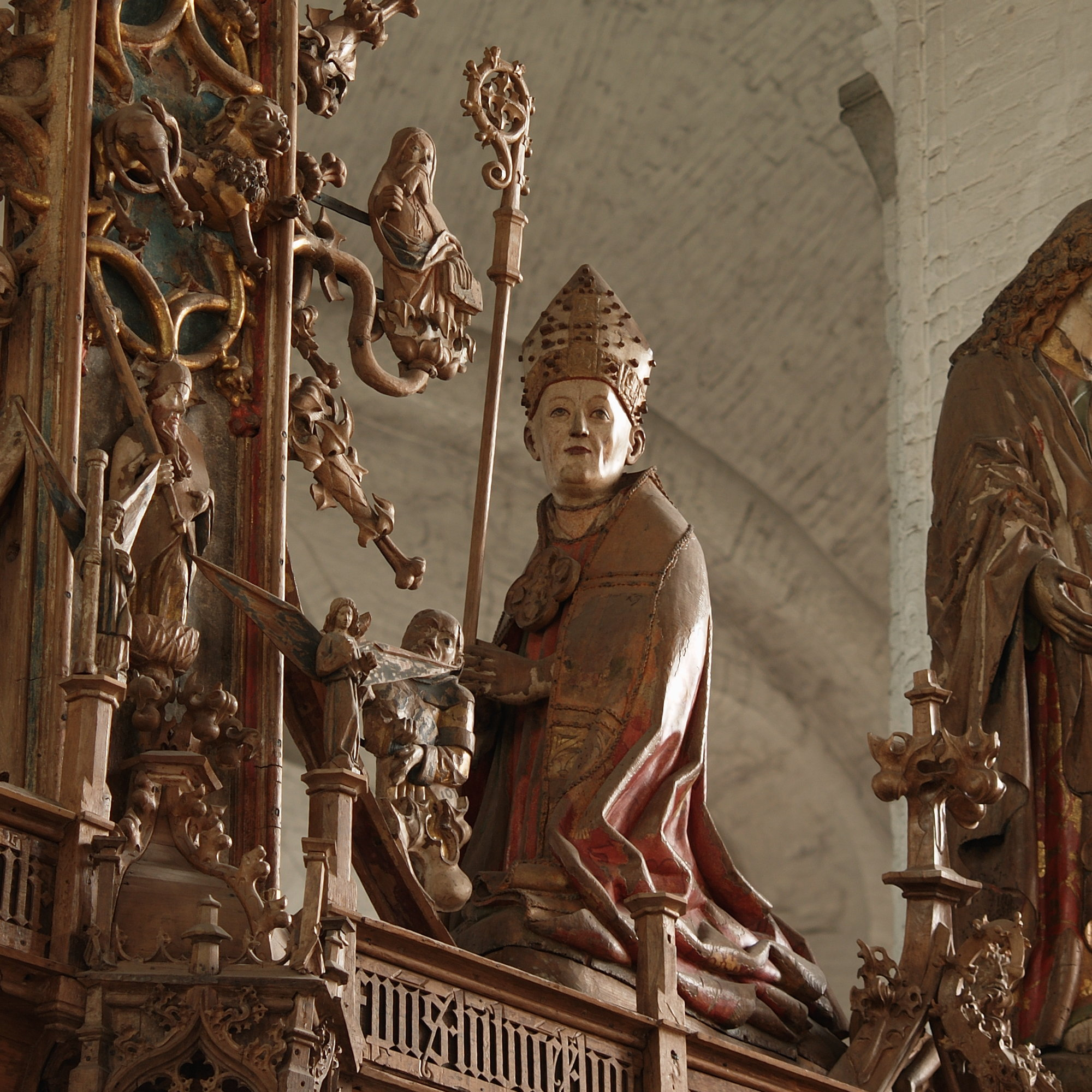 Statue des Lübecker Bischofs Albert II. Krummendiek unter dem Triumphkreuz von Bernt Notke von 1477 im Dom zu Lübeck